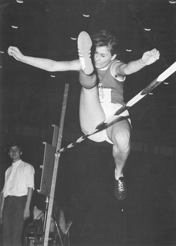 Gundula Diel Zentralbild Wendorf 21.1.62 Berliner Leichtathleten eröffneten Hallensaison Das erse Hallensportfest der Leichtathleten fand am 21.1.62 in der Berliner Dynamo-Sporthalle statt. UBz: Die Siegerin im Hochsprung der Frauen, Gundula Diel (SC Einheit, Berlin) , überquert die Latte bei 1,40 m.